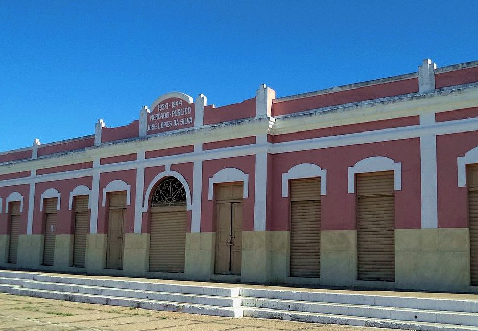 Conjunto Histórico e Paisagístico de Oeiras. Oeiras/PI